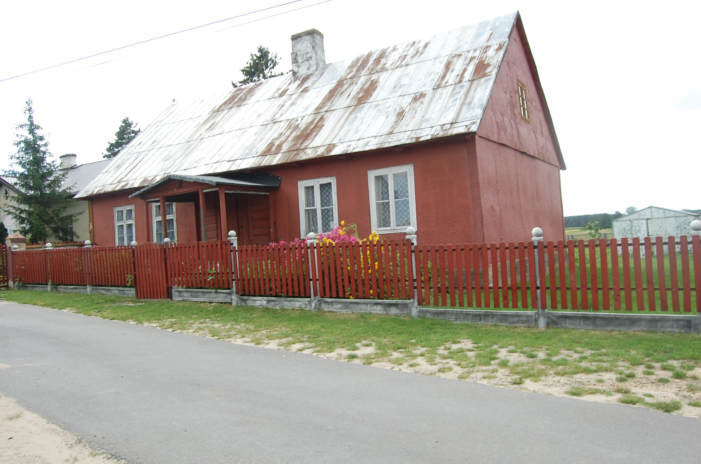 Budynek dawnej plebanii w Jeruzalu